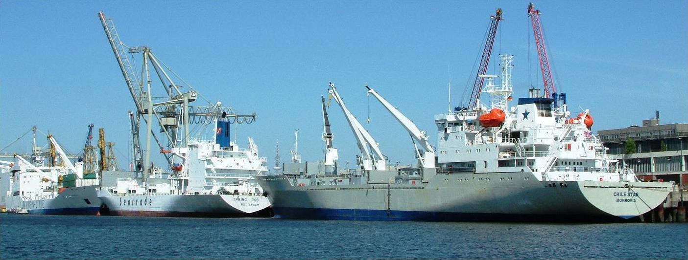 Kühlschiffe am Hamburger Fruchtzentrum SPRING BOB IMO Number: 8213665 MMSI Number: 244915000 Callsign: PCBT Length: 151 m Beam: 24 m Flag: Netherlands CHILE STAR IMO Number: 9017276 MMSI Number: 636012747 Callsign: A8HP4 Length: 140 m Beam: 22 m Flag: Liberia